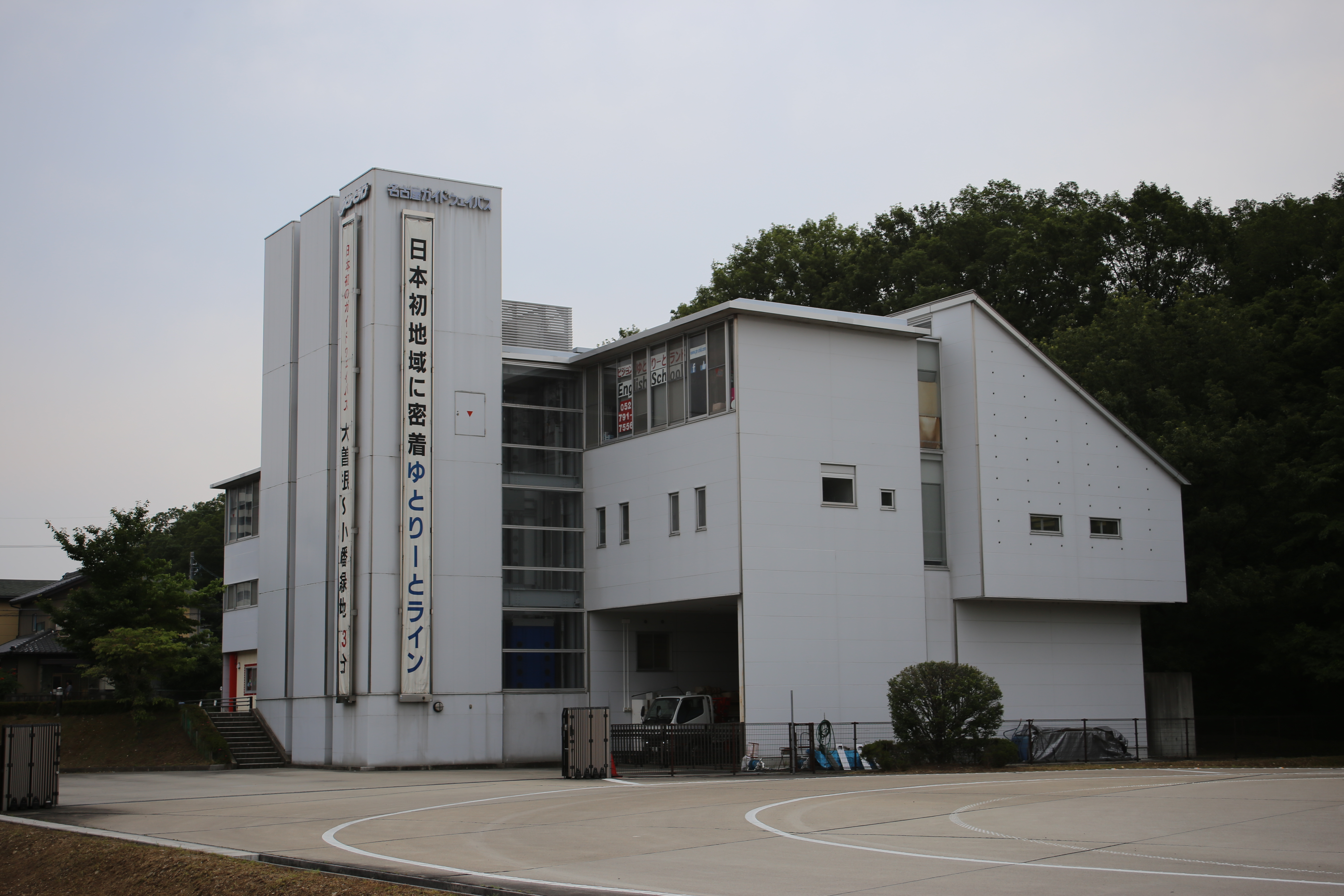 名古屋市守山区竜泉寺二丁目の名古屋ガイドウェイバス本社を北側公道西側より撮影